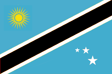 Bandera de las Islas Caribe y Los Lobos